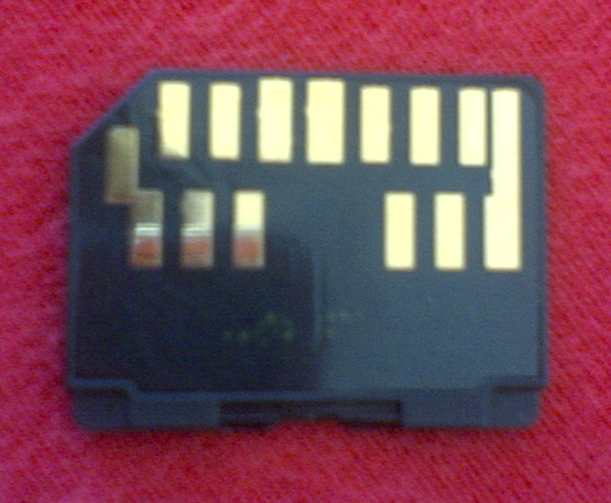 Photo einer RS-MMC-Mobile-Karte von Transcent